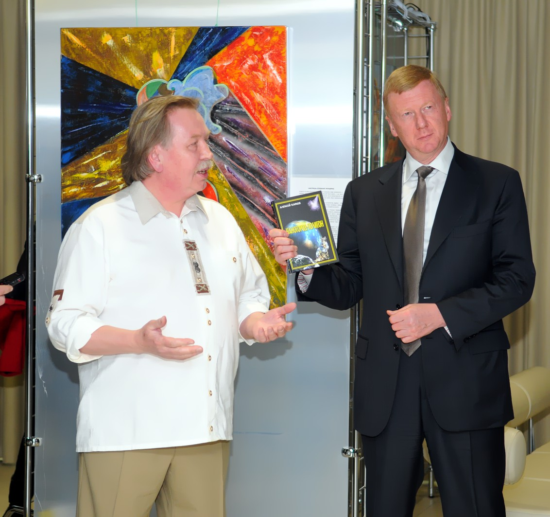 Алексей Алексеевич Караев вручает книгу Наногород-полигон Анатолию Борисовичу Чубайсу во время открытии выставки А. Караева "Неуловимая реальность" (Искусство с нанотехнологиями)» в ОАО Роснано